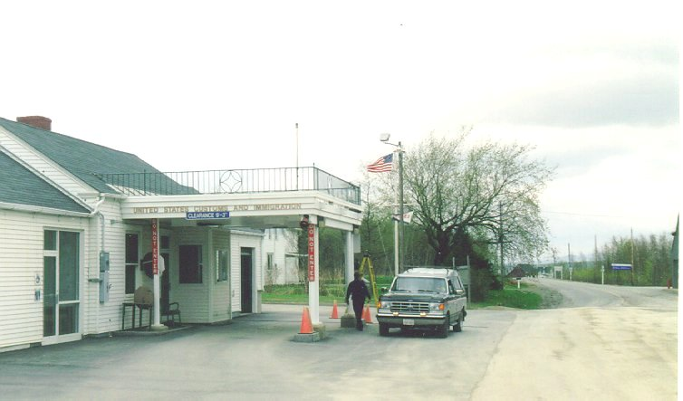 Limestone Maine Border Station